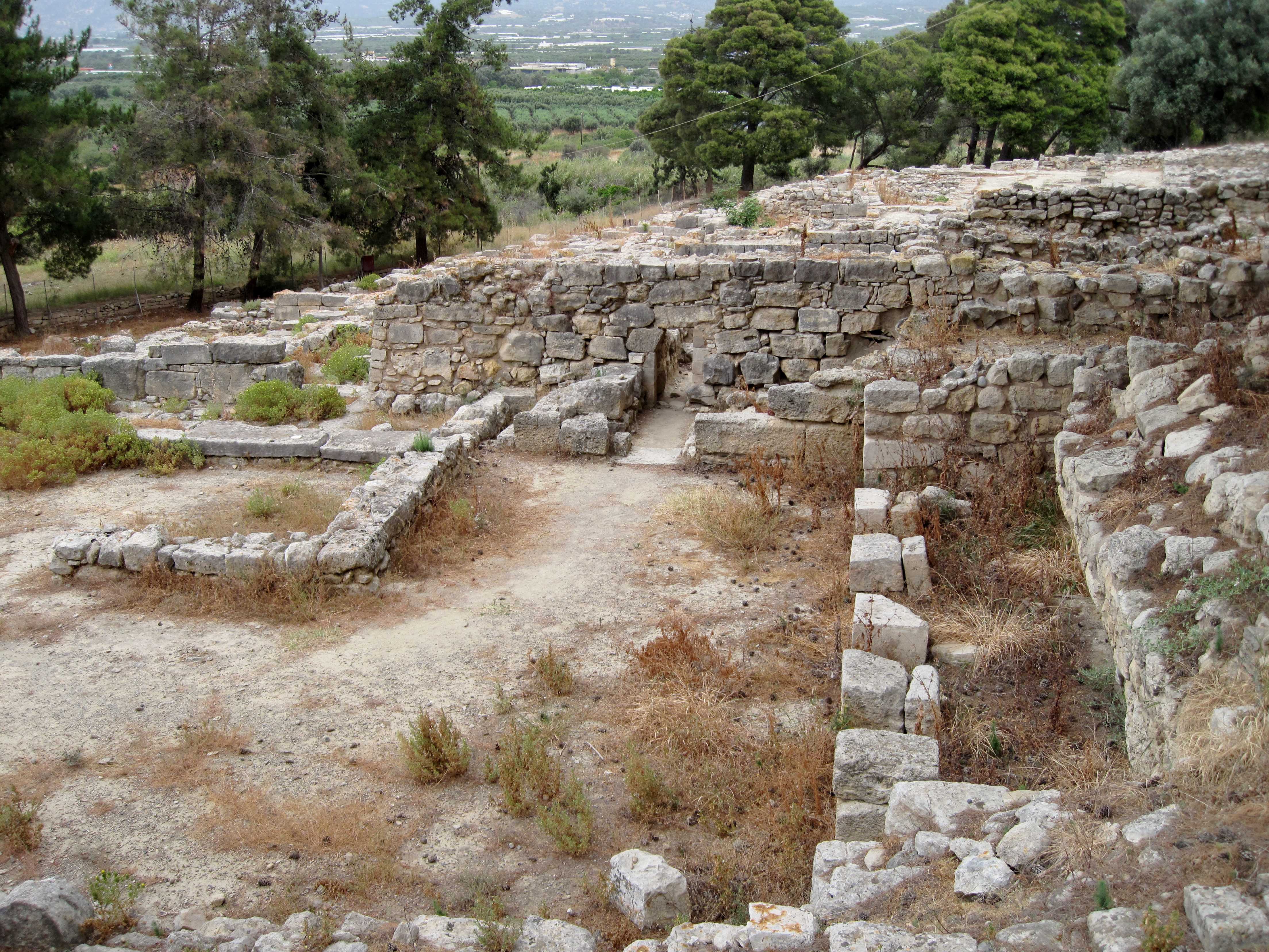 Ausgrabungsstätte von Agia Triada in der Gemeinde Festos, Regionalbezirk Iraklio, Kreta, Griechenland